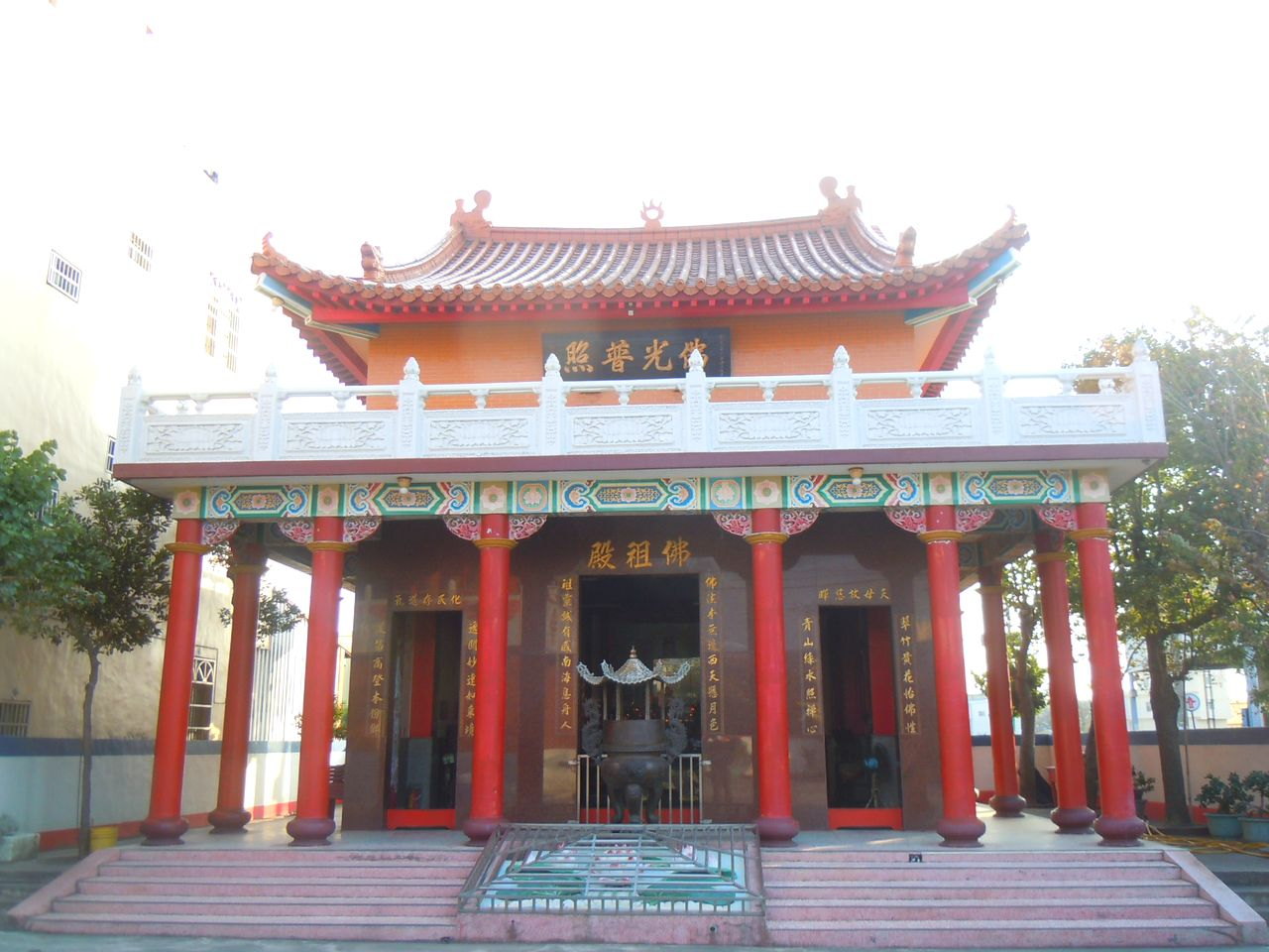 中文（台灣）: 彰化縣和美鎮嘉犁里東坡路17巷臨10號－嘉犁嘉安宮。